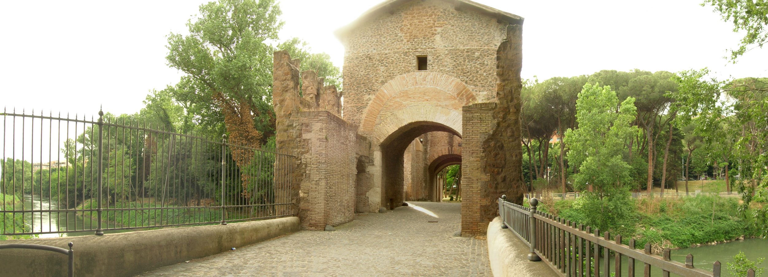 Ponte Nomentano